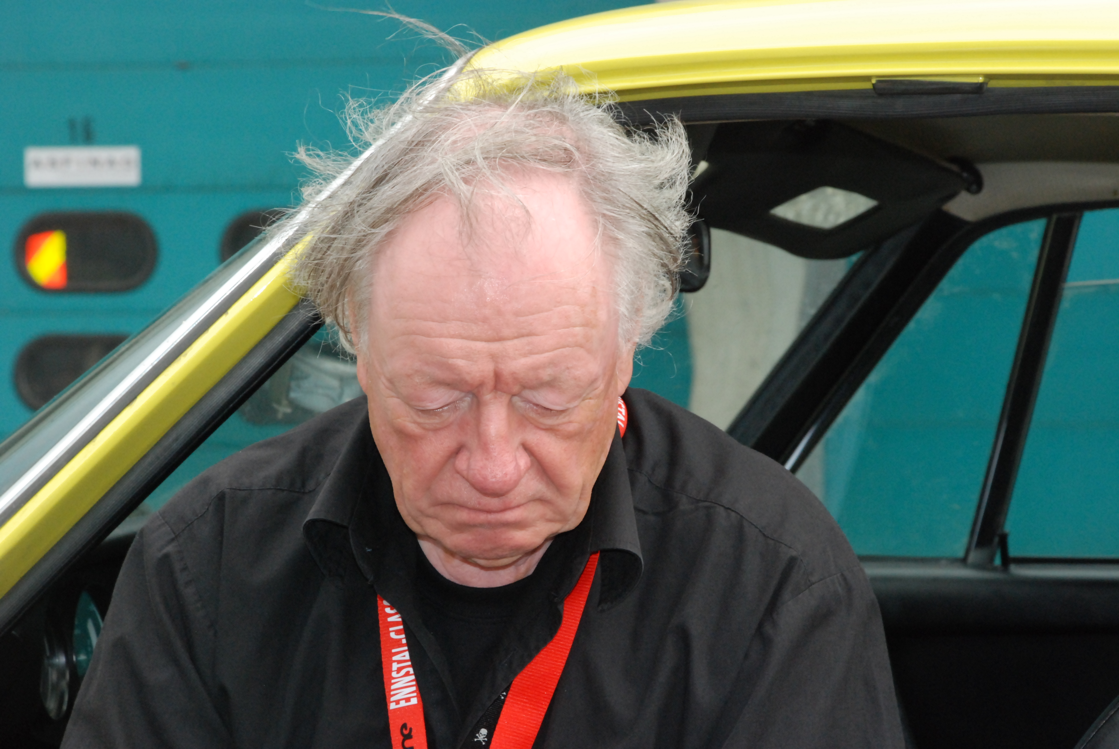 Rauno Aaltonen bei der Ennstal-Classic 2008